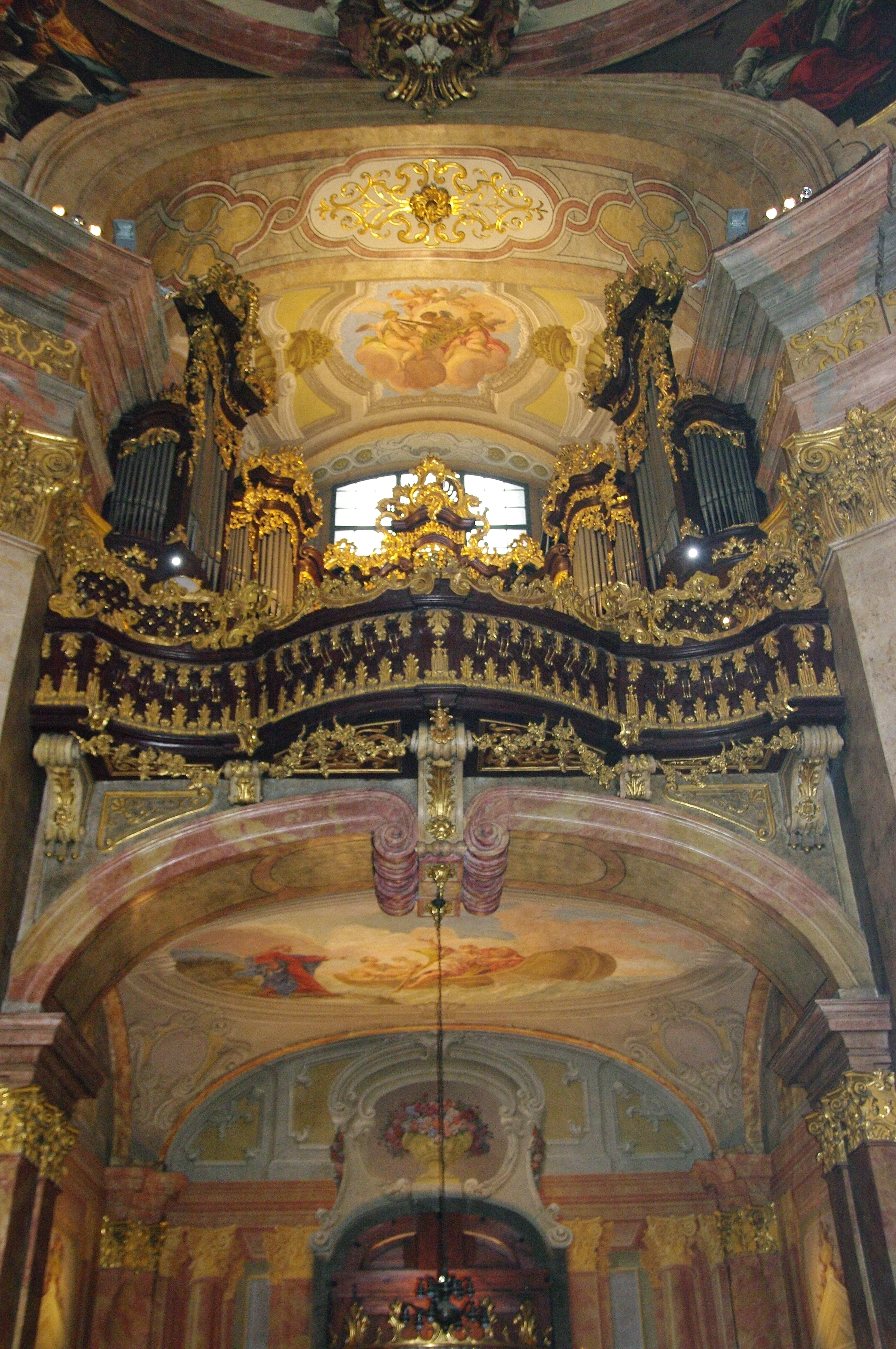 Rückseite Peterskirche Wien mit Orgelempore